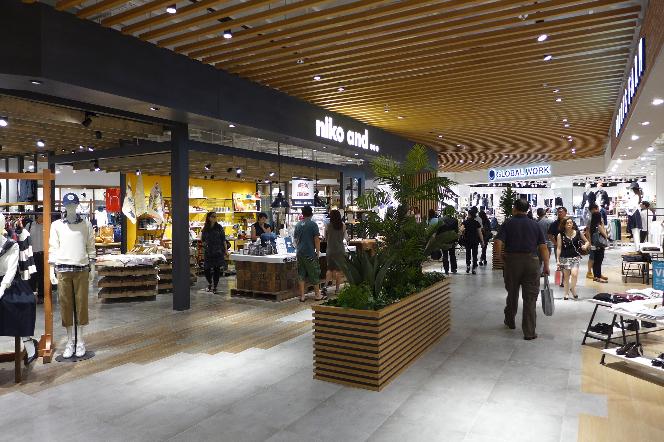 YOHO MALLI Atrium